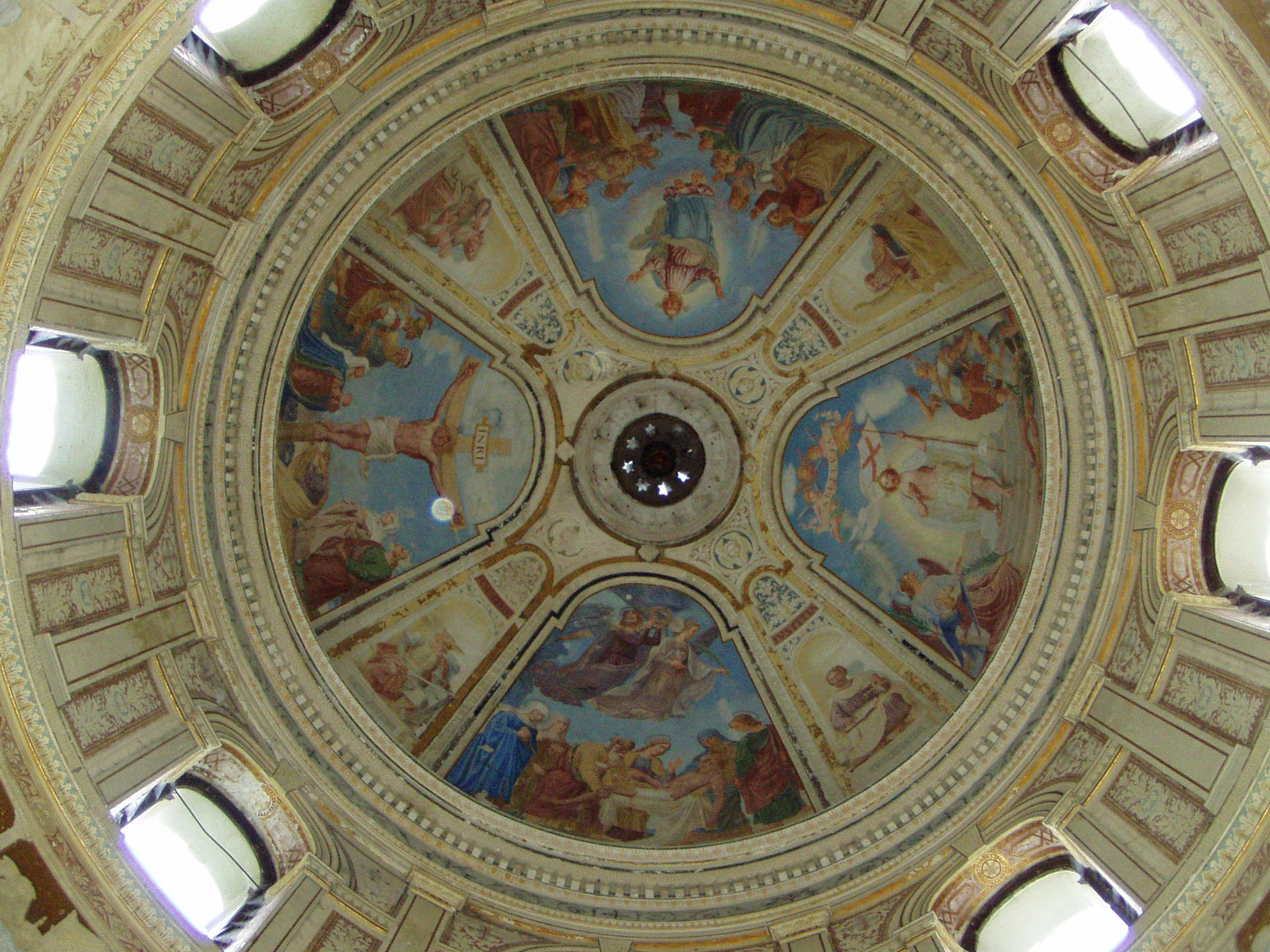 Detail stropu interiéru mausolea